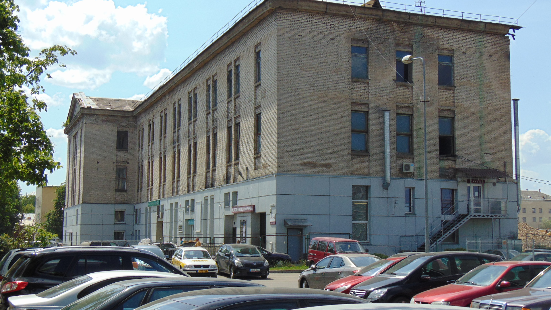 AB „Grąžtai“ buveinė